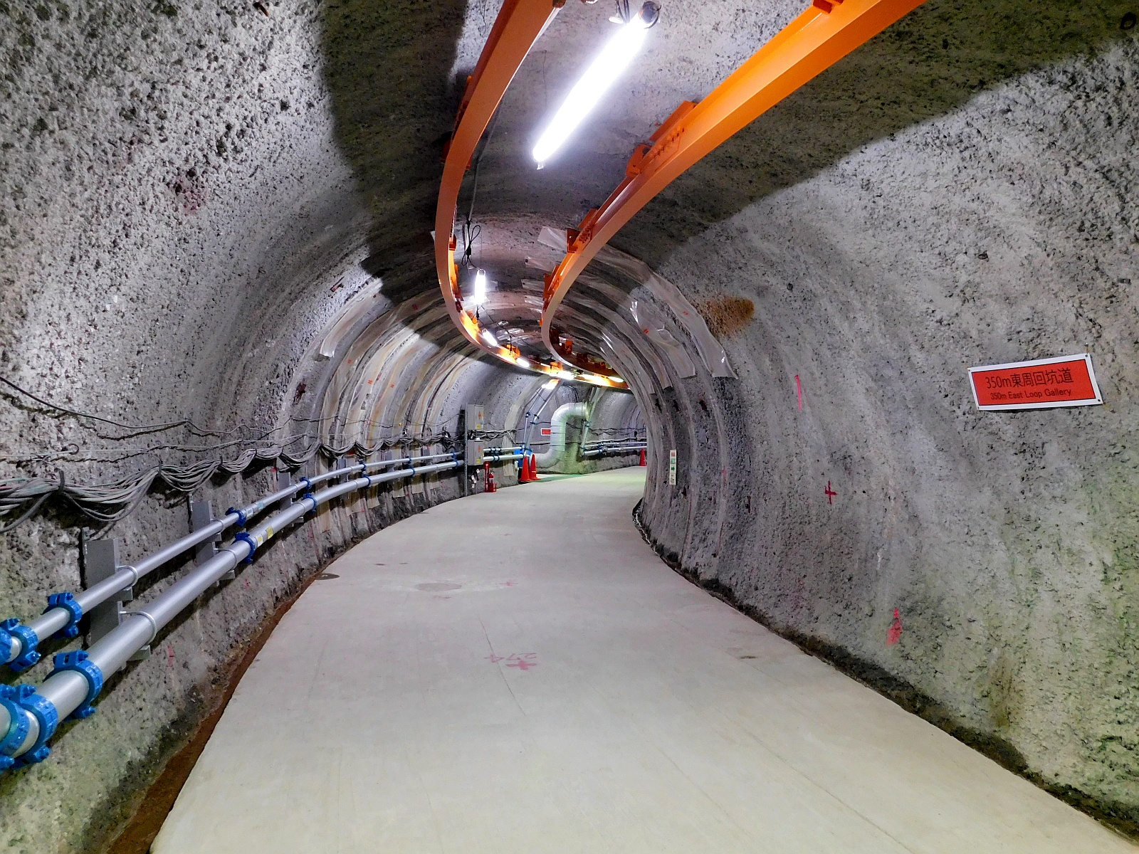 北海道天塩郡幌延町にある幌延深地層研究センターの深度350m調査坑道の東周回坑道